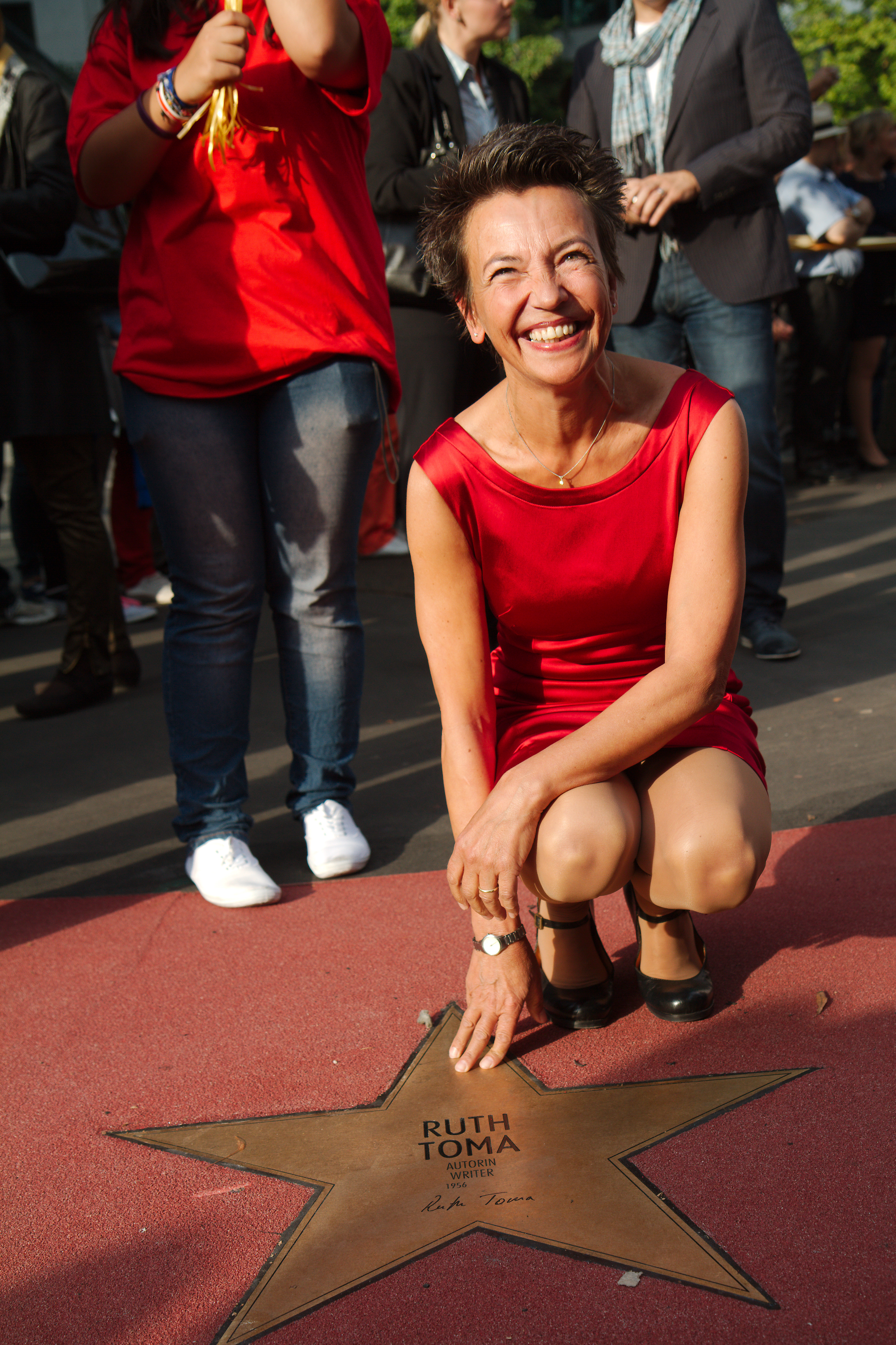 Sitzt vor ihrem Stern